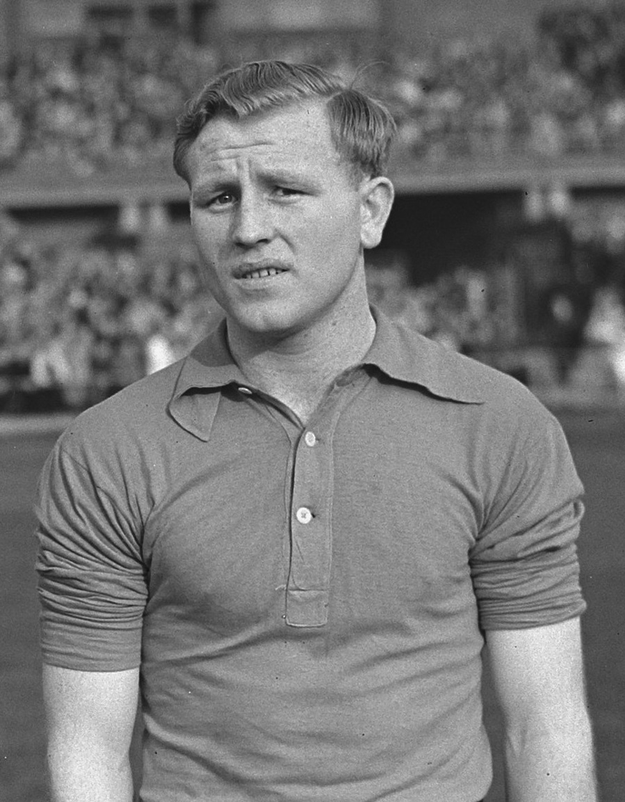 Wim Bleijenberg.